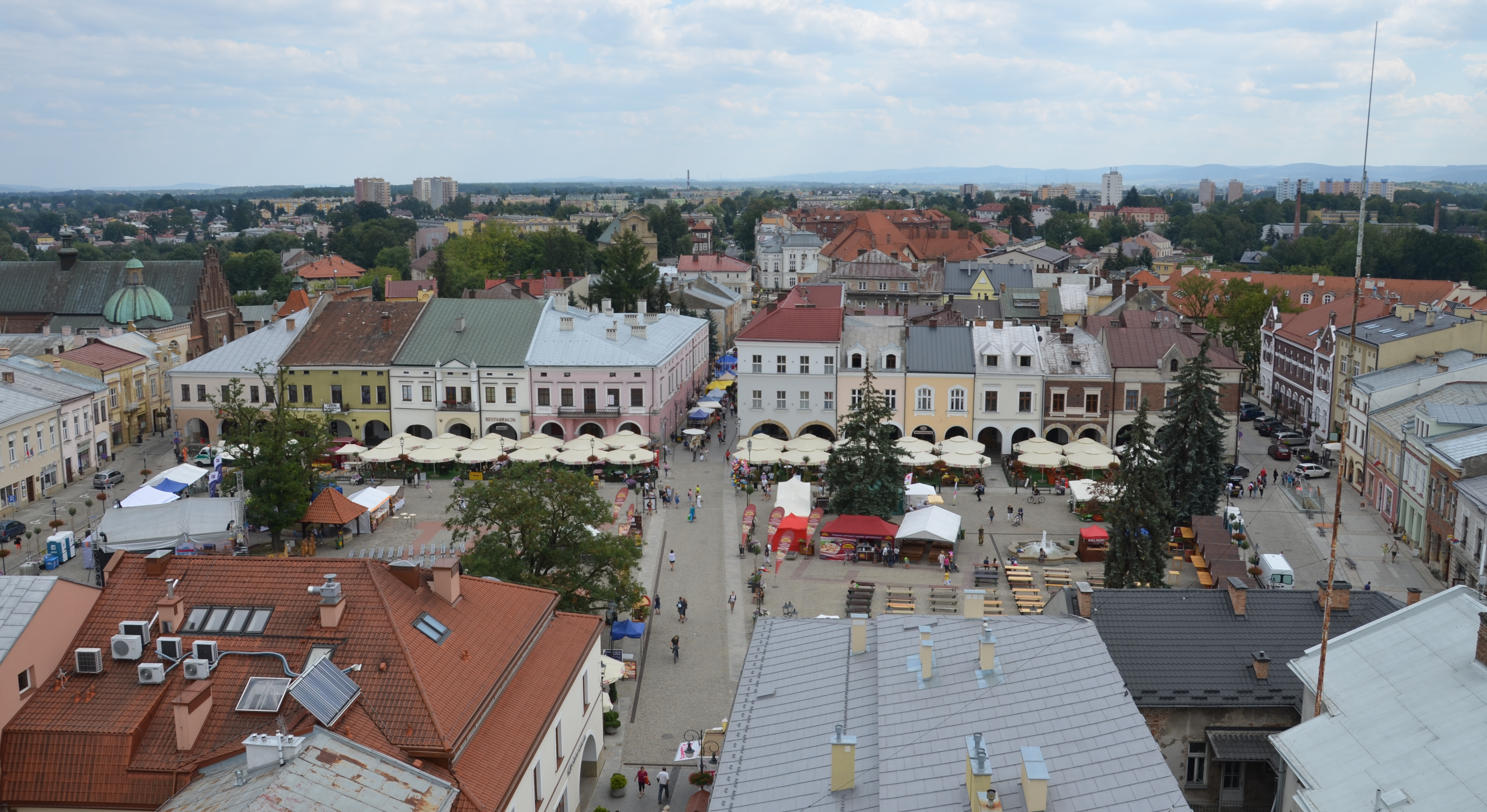 Krosno vom Turm der Dreifaltigkeitskirche aus gesehen